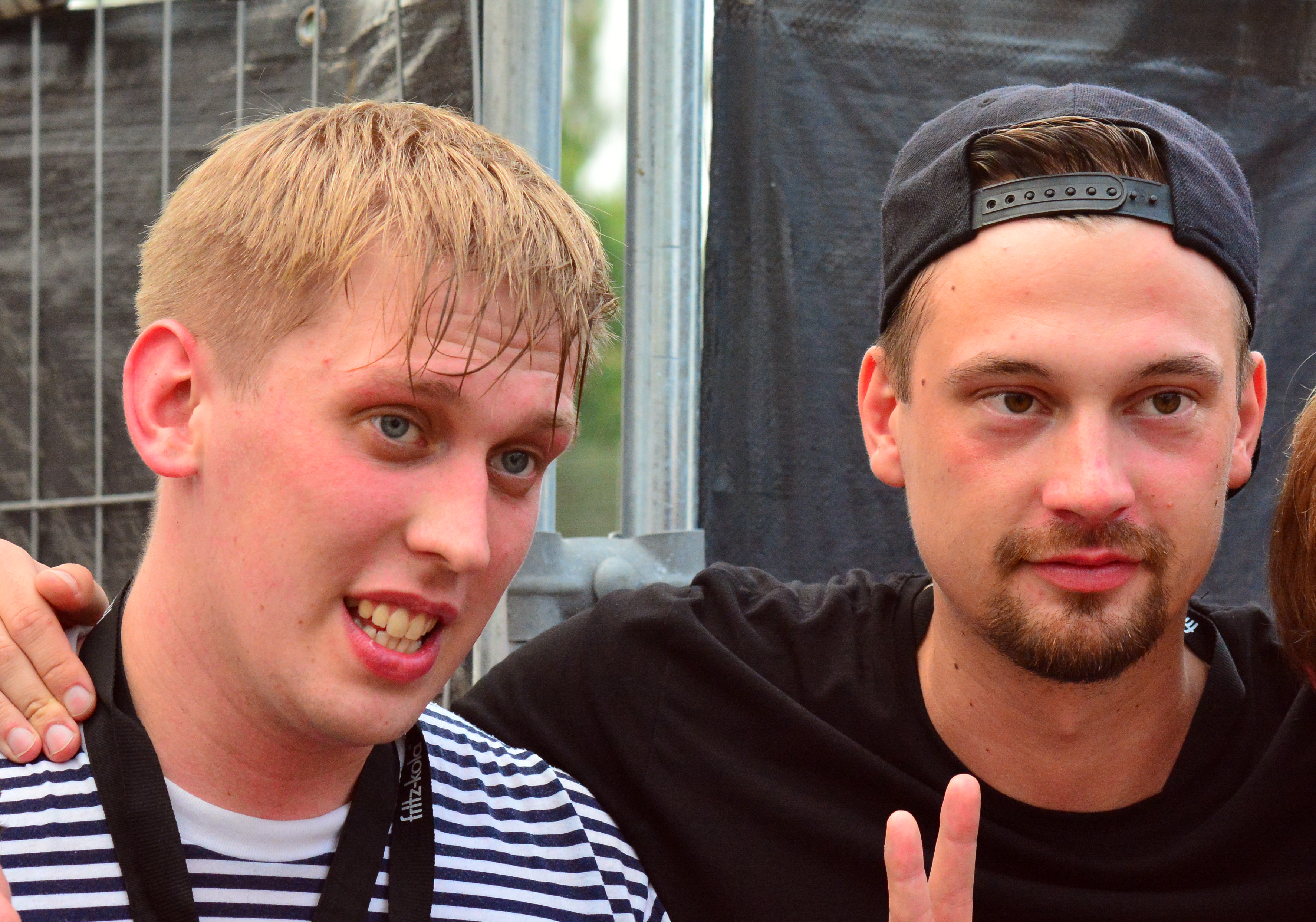 Zugezogen Maskulin beim Ackerfestival 2014